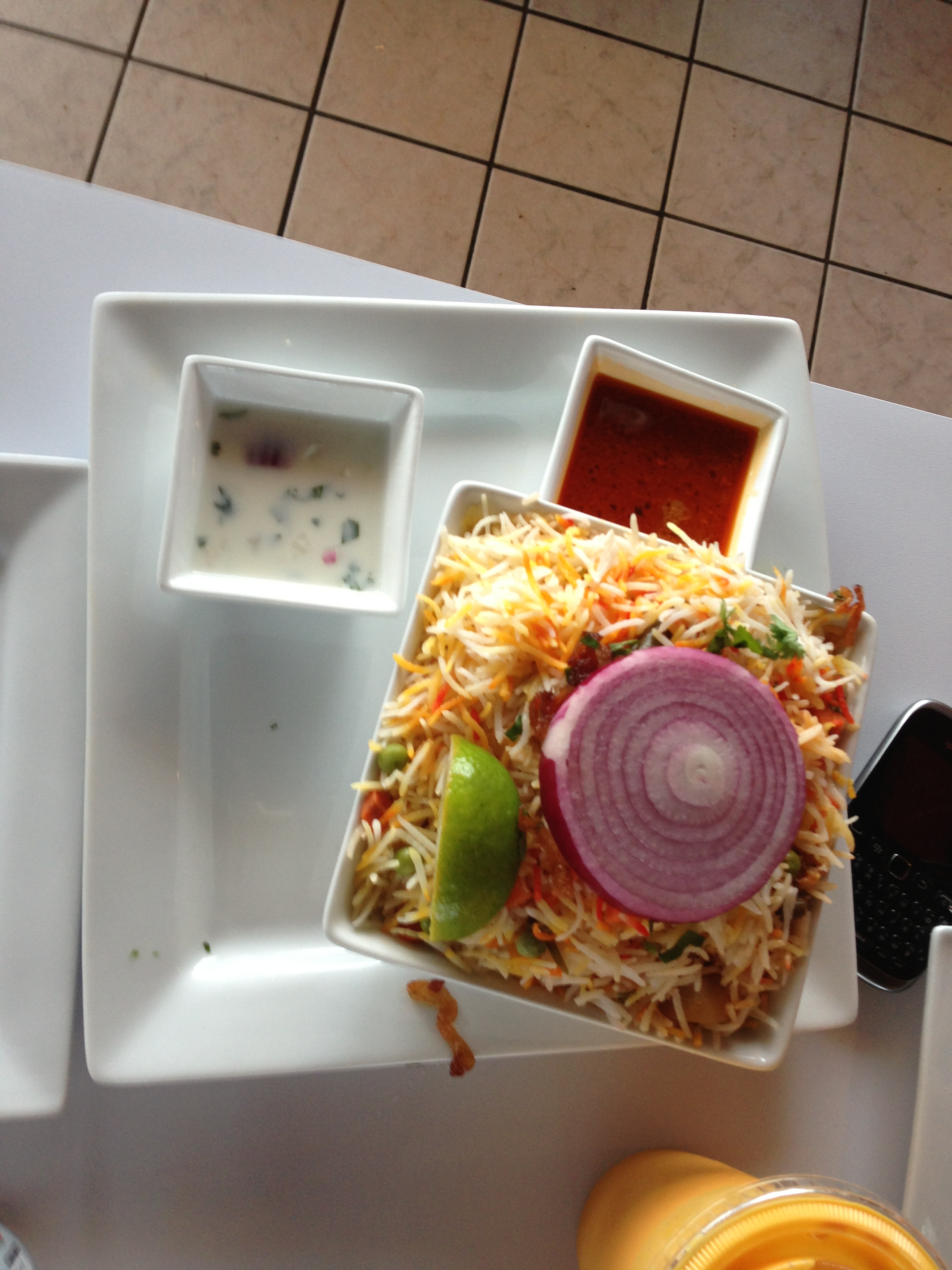 Vegetable Biriyani (Hyderabadi) served in Tampa USA.